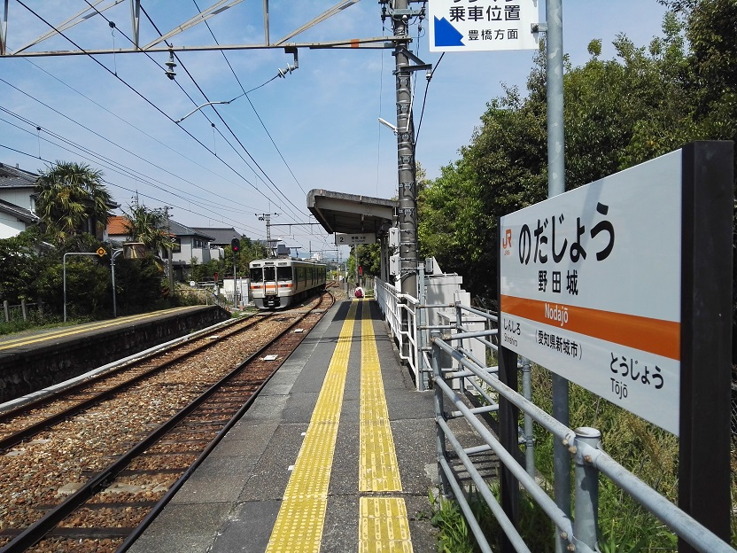 Nodajo station platform